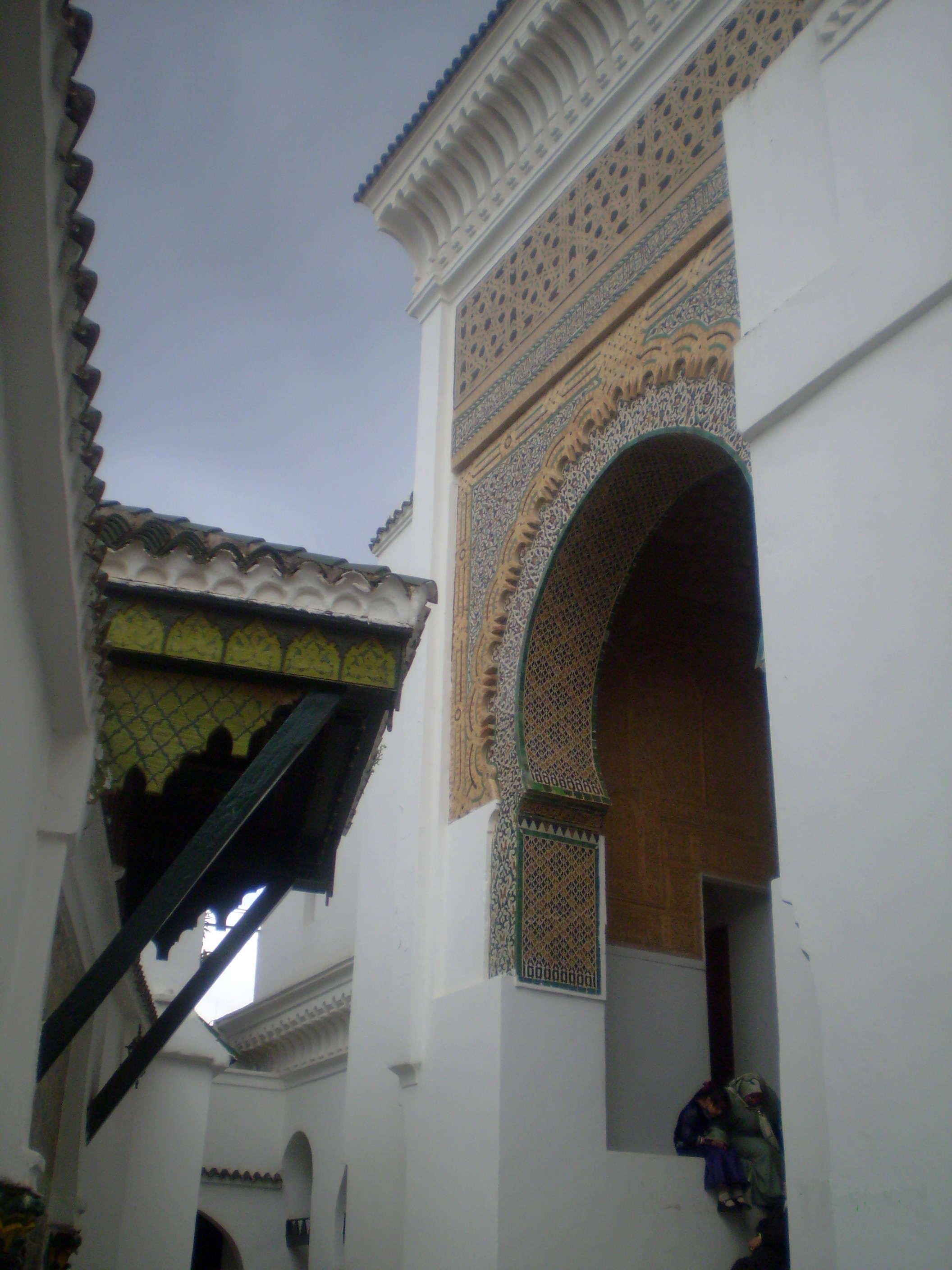 Entrées du mausolée et de la mosquée de Sidi Boumediene